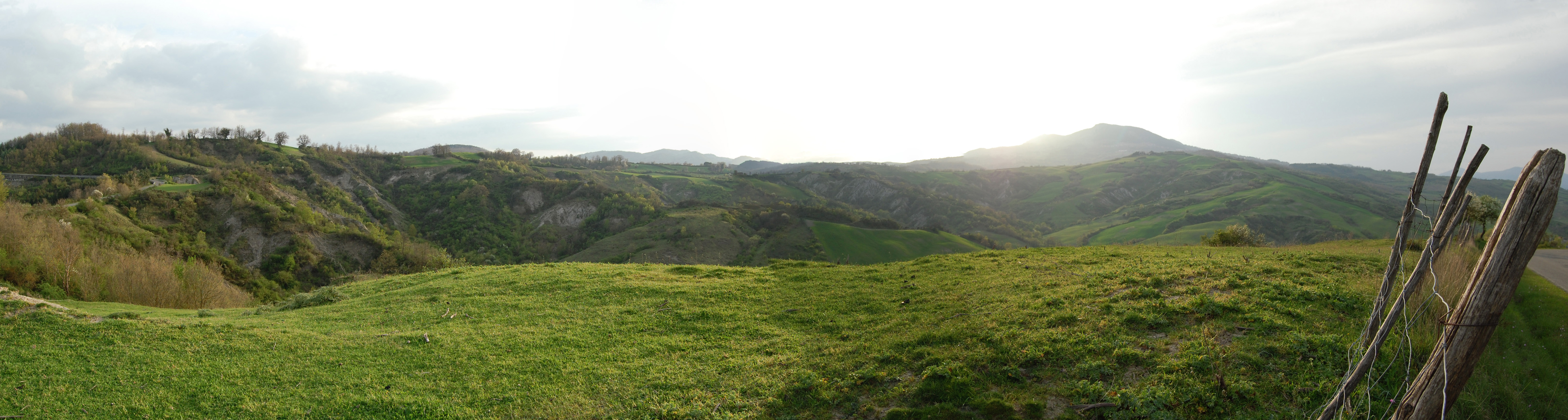 Panorama tipico toscano tra il Monte Amiata e la Val d'Orcia